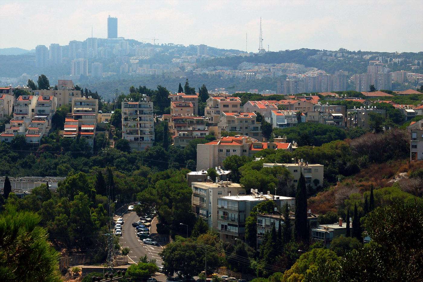 see title